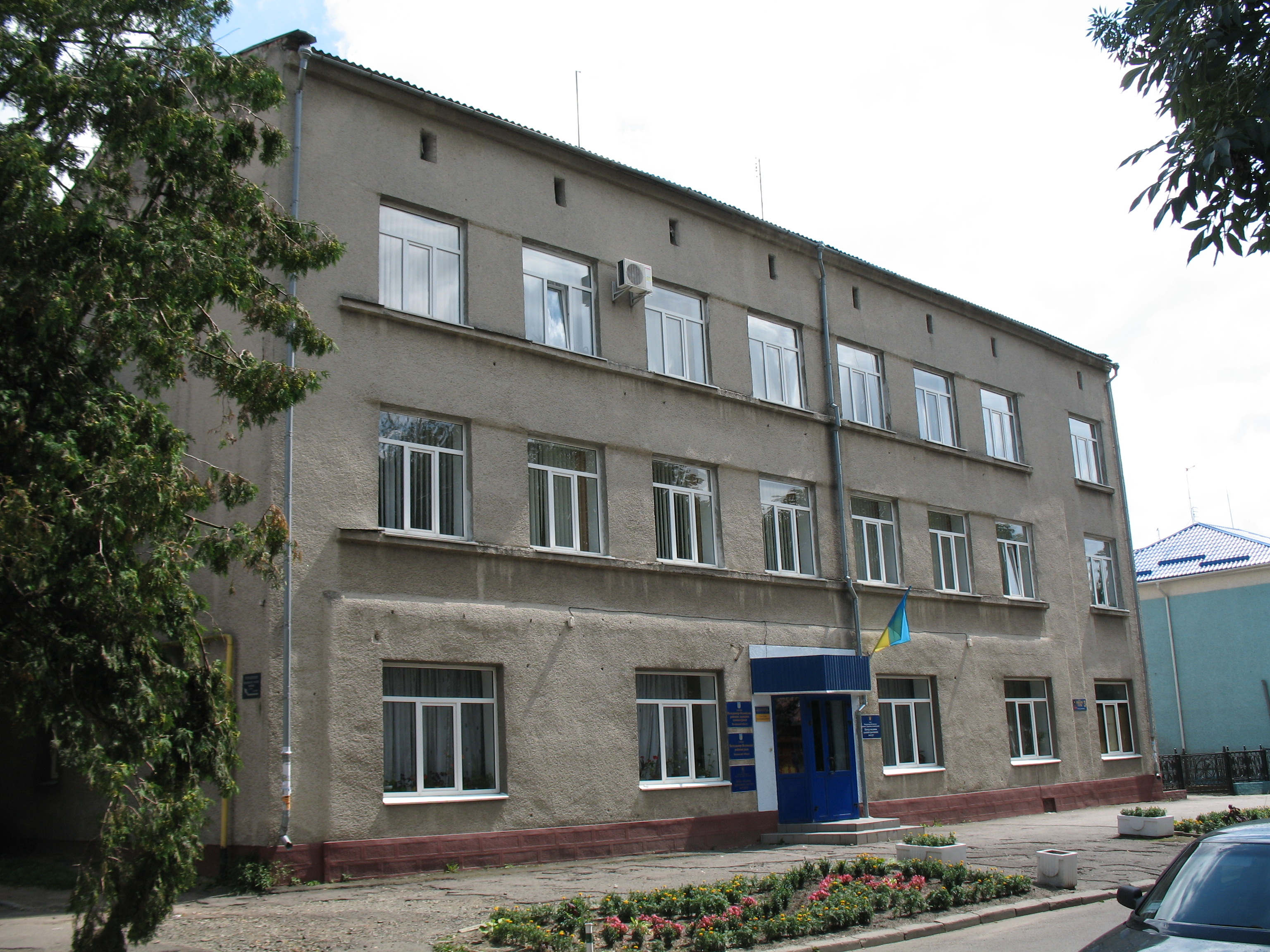 Володимир-Волинський. Будинок родини Гольдштейнів (будинок районної державної адміністрації)